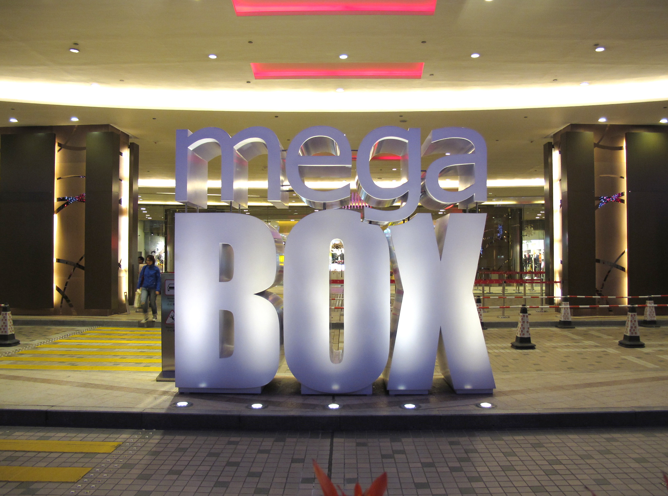 MegaBox Entrance sculpture